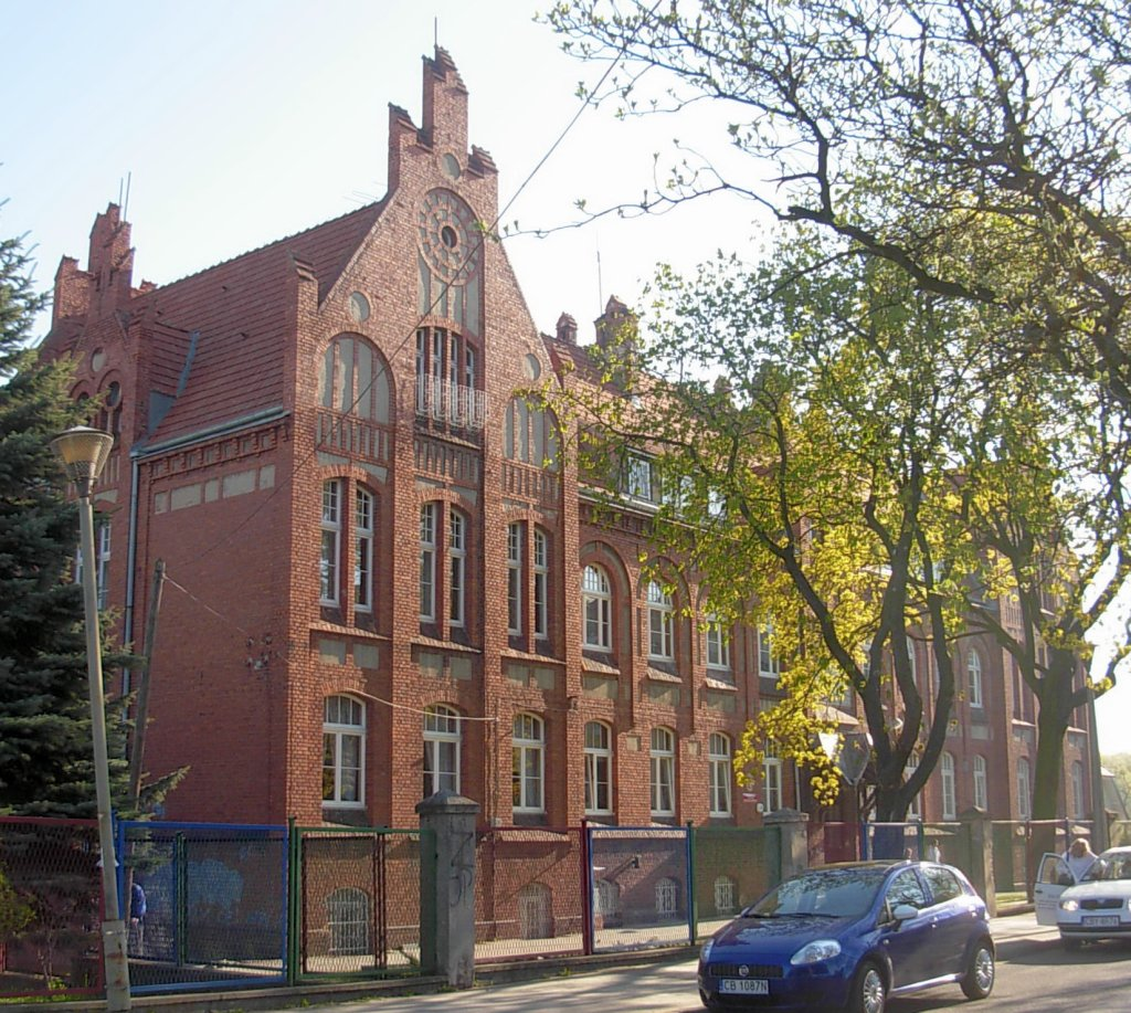 Bydgoski Zespół Placówek Opiekuńczo-Wychowawczych, ul. Traugutta 5 (1905-07, Carl Meyer), dawniej sierociniec miejski fundacji Hermanna Dietza